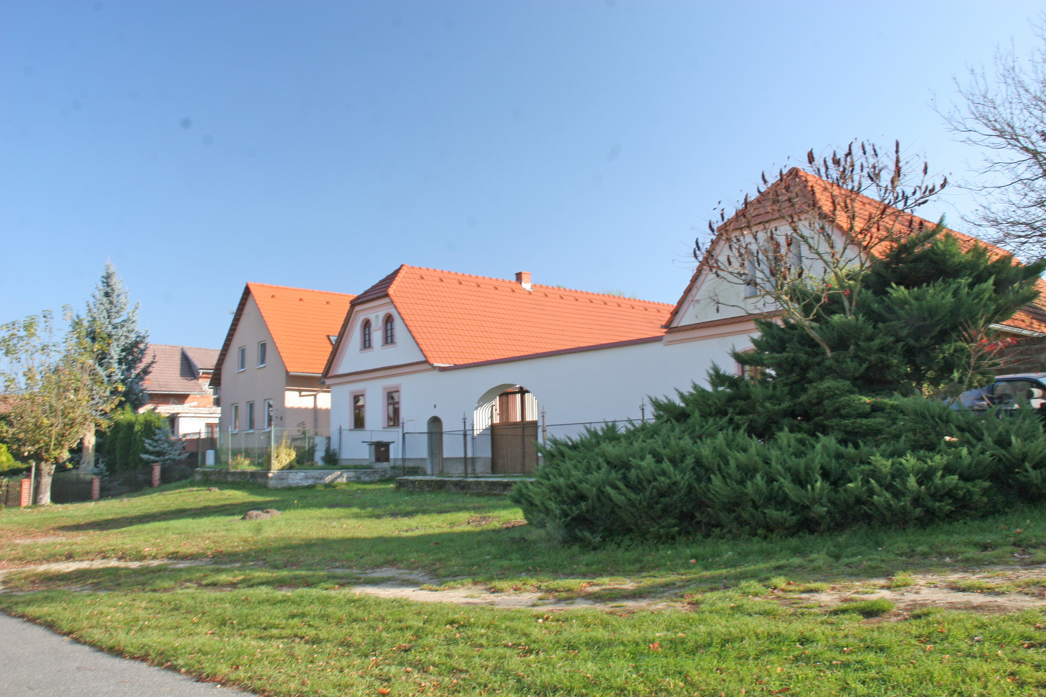 Usedlost čp. 8, Týnišťko 8, Týnišťko.